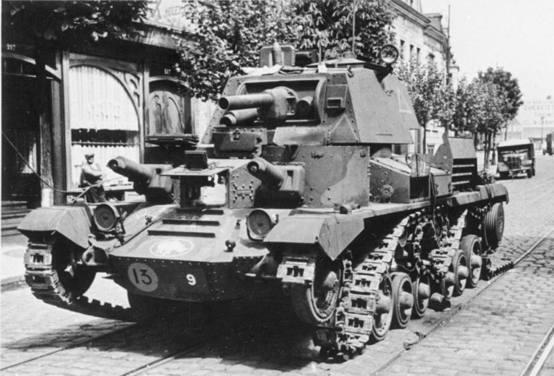 Englischer Panzer in Calais-Vorstadt. Calais. 27.5.1940, 13 Uhr